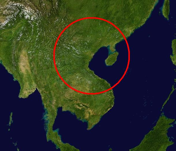 Karte auf der die Verbreitung der Chinesischen Zacken-Erdschildkröte zu sehen ist. Verbreitung der Chinesischen Zacken-Erdschildkröte